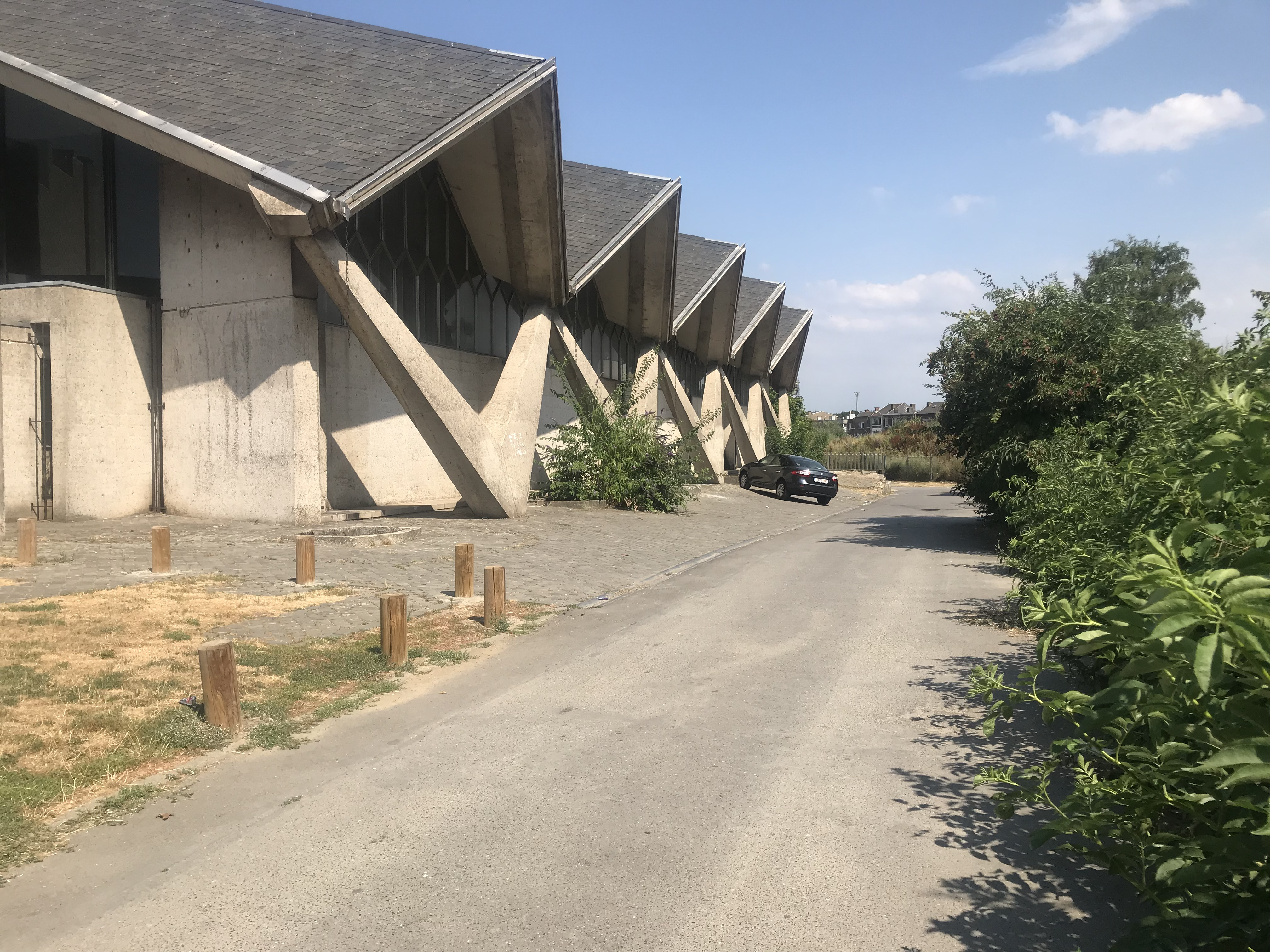 Eglise paroissiale Saints-Pierre-et-Paul à Droixhe, Liège